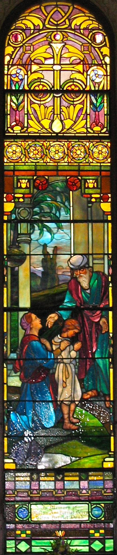 Zion Church's window "Hannah & Little Samuel"